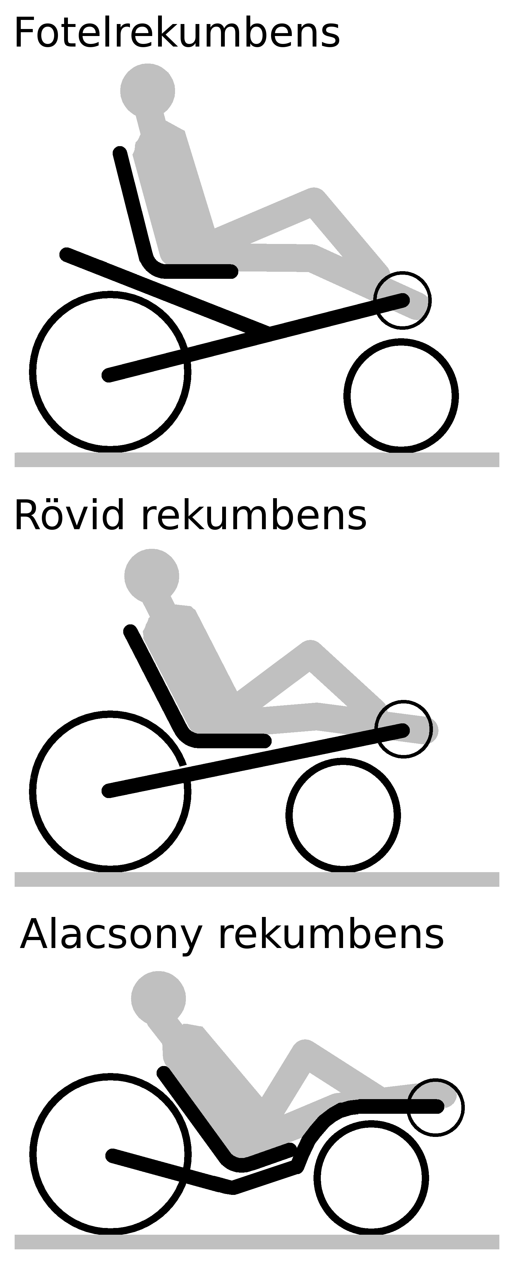 Drei Liegeradtypen im Vergleich